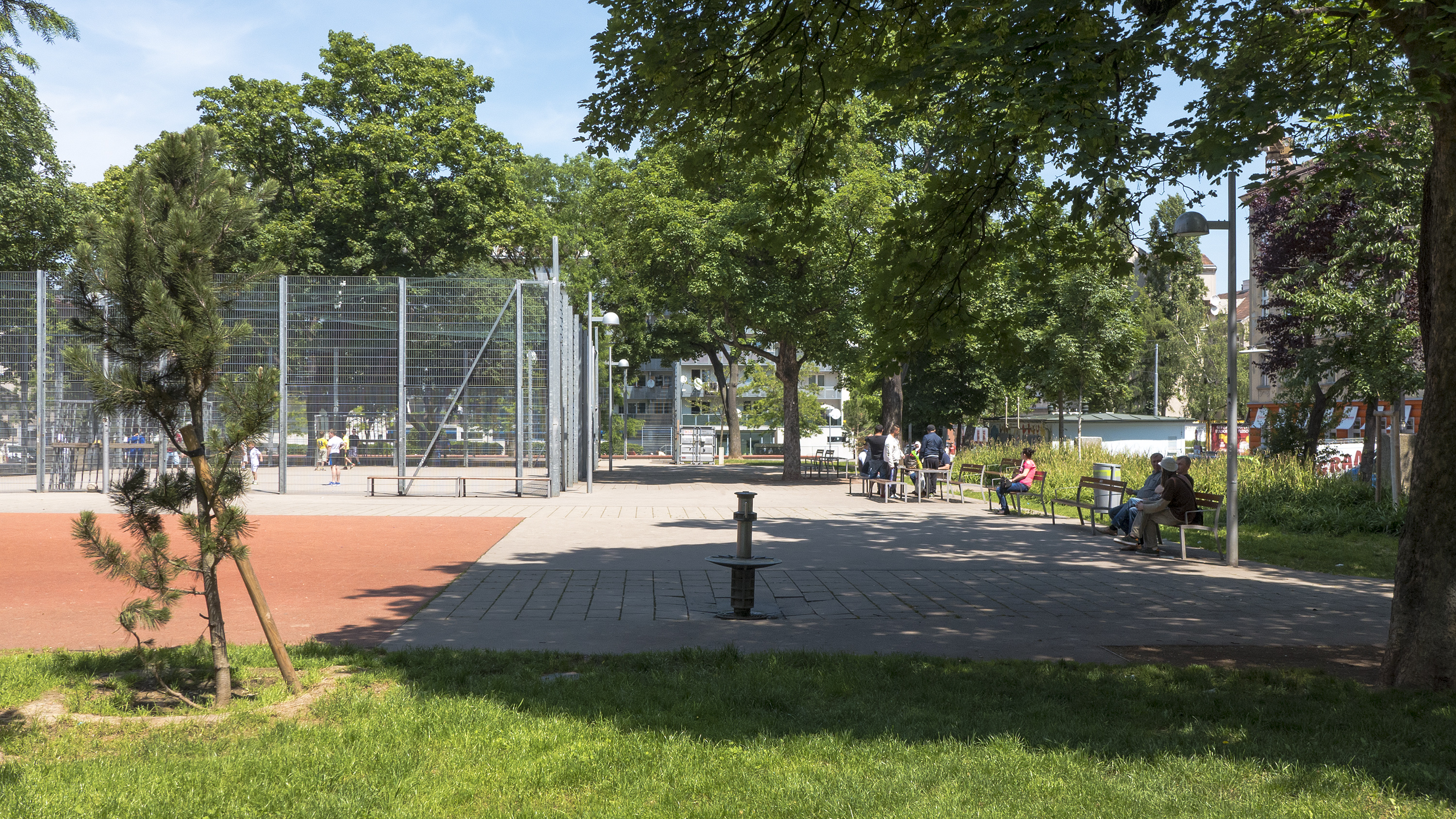 Laubepark in Wien 10